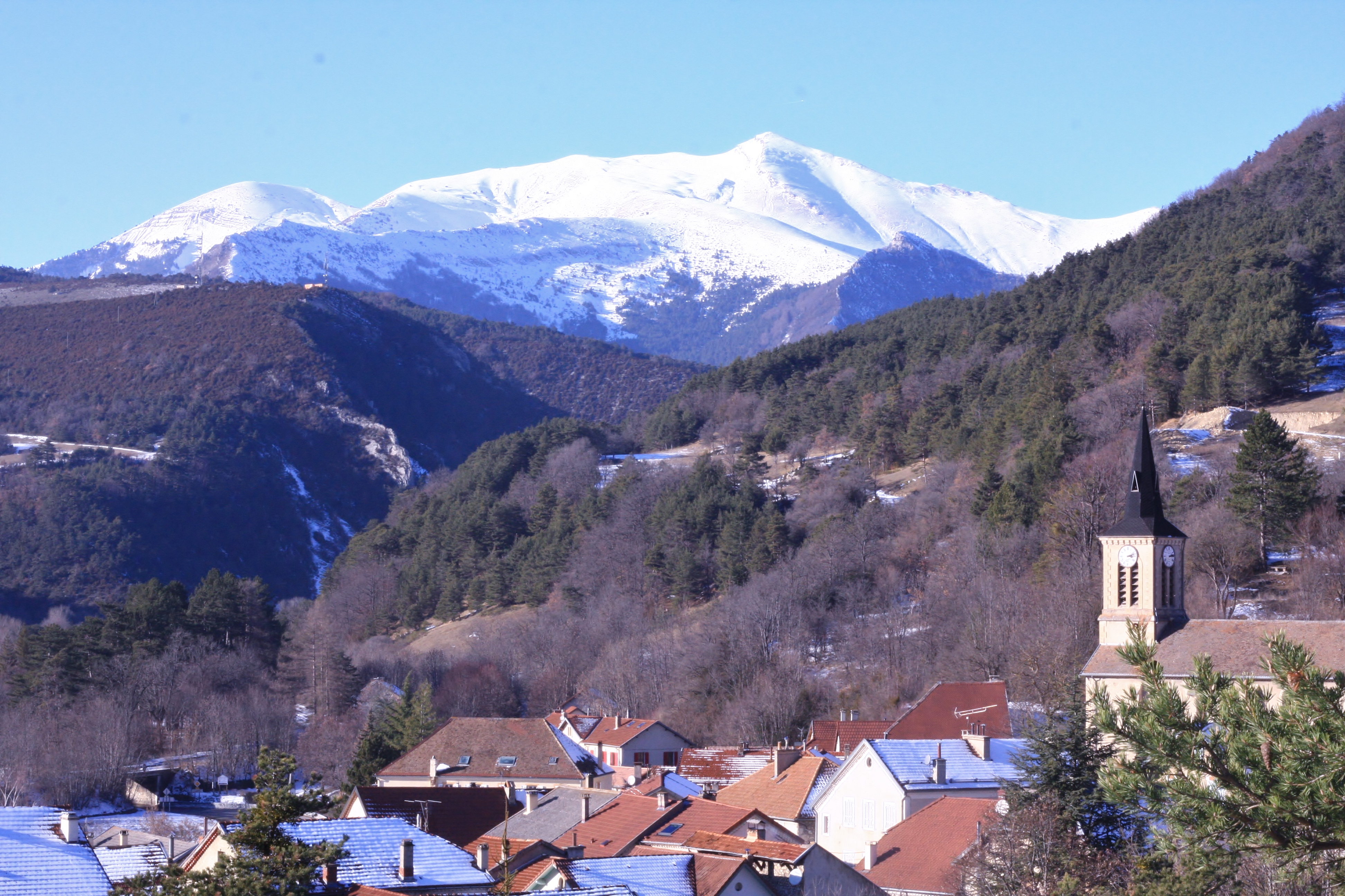 Toussière en arrière-plan du bourg.